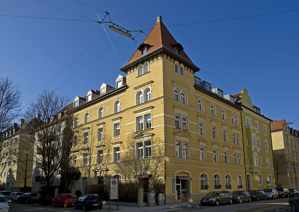 Kaiserstraße 46, Mietshaus, viergeschossiger Neurenaissance-Eckbau mit Zeltdach-Eckturm sowie Putz- und Stuckgliederung, 1890–1891; 1900–1901 wohnte hier Wladimir Iljitsch Lenin.